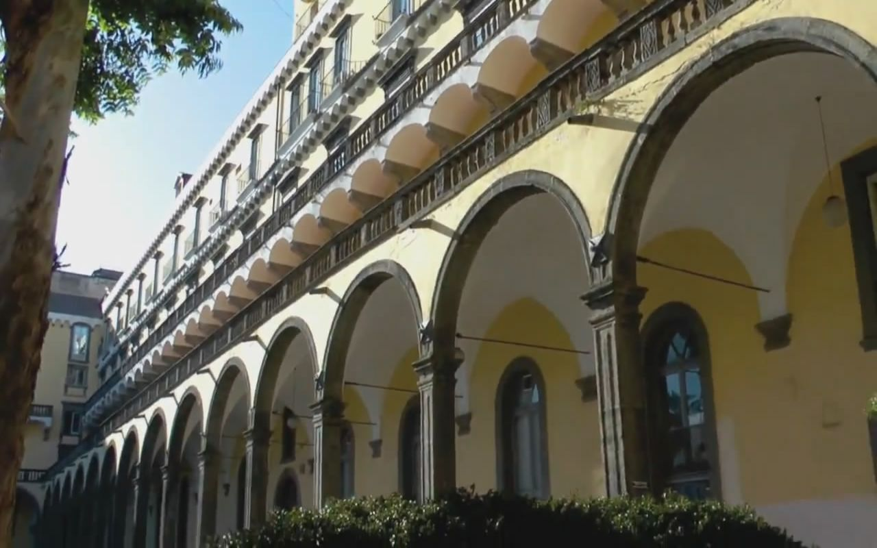 Chiostro del complesso monastico dei Santi Marcellino e Festo (Napoli)